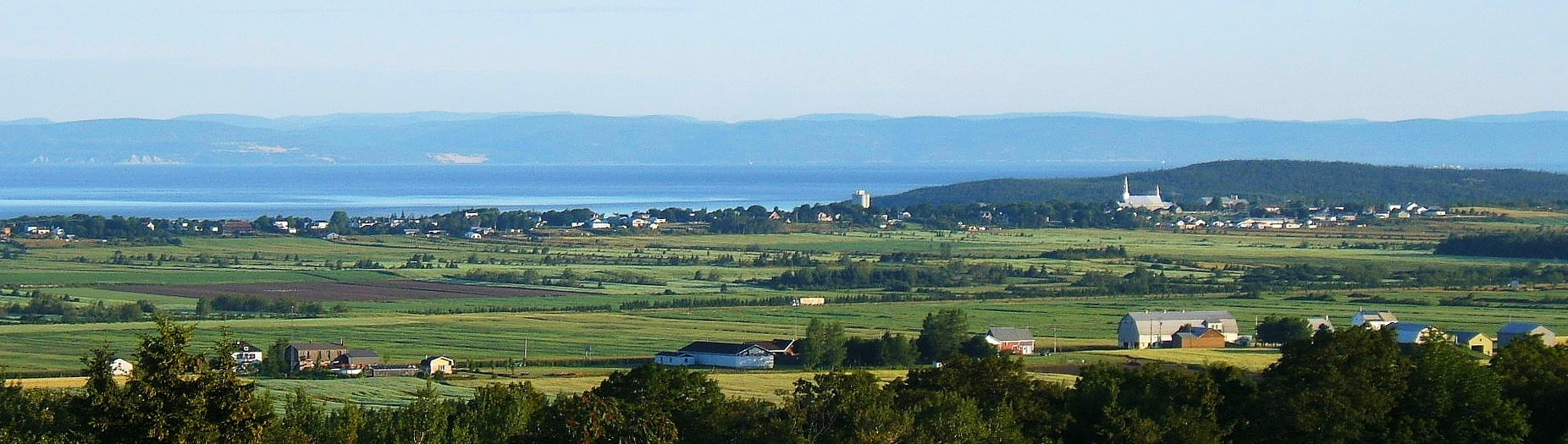 Village de Cacouna (Québec), vue du chemin des Pionniers à Rivière-du-Loup, avec le fleuve Saint-Laurent et les montagnes de Charlevoix en arrière-plan. Et un petite ferme. Auteur : Nicolas Gagnon, août 2006.--24.226.146.5 15:41, 20 March 2007 (UTC)